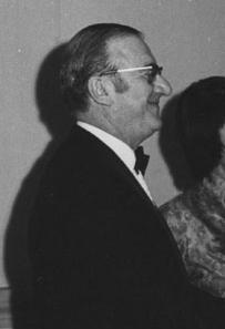 Morris Finer